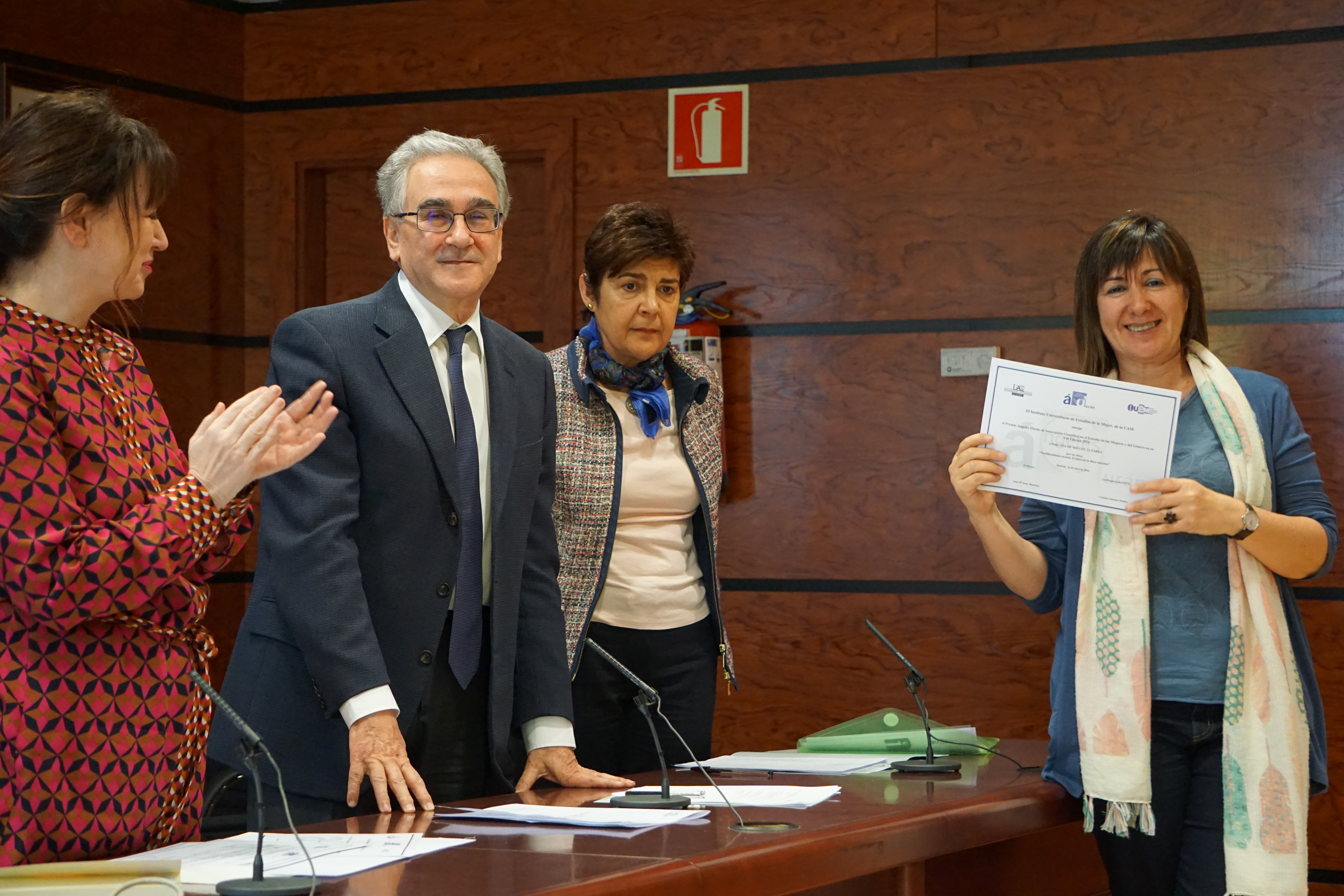 El rector de la Universidad Autónoma de Madrid José María Sanz entrega a Ana de Miguel el documento que acredita el VII Premio Ángeles Durán de Innovación Científica en el Estudio de las Mujeres y del Género que otorga el Instituto Universitario de Estudios de la Mujer de la Universidad Autónoma de Madrid